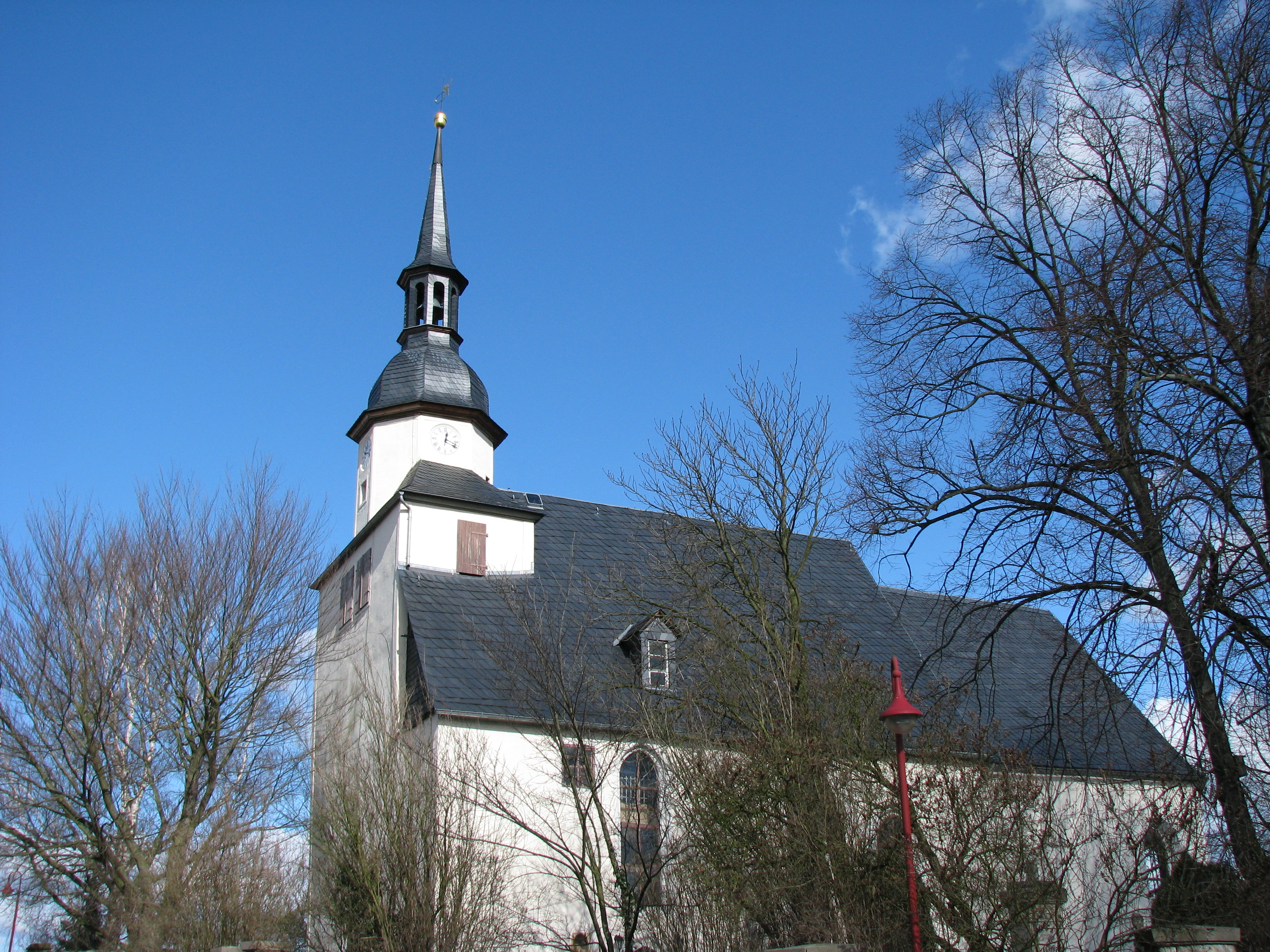 Blick auf die Hardislebener Kirche